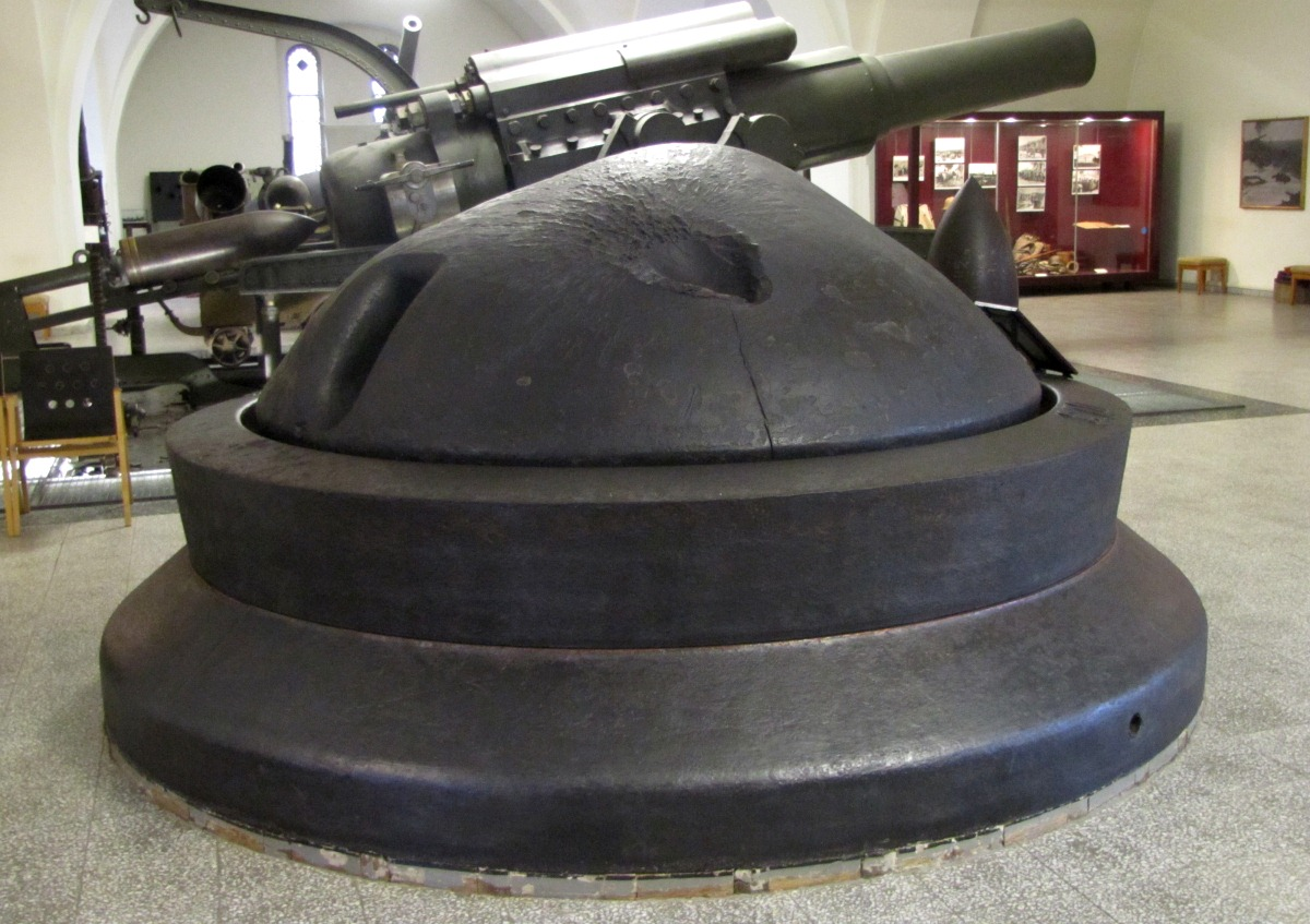 Festungskuppel im Heeresgeschichtlichen Museum Wien (Saal Erster Weltkrieg). Genaue Beschreibung: 8cm M1894 Steil-Panzerkuppel aus dem Werk 1/2 Siedliszka, Gruppe Przemysl, für 8 cm Panzerkanone M1894.